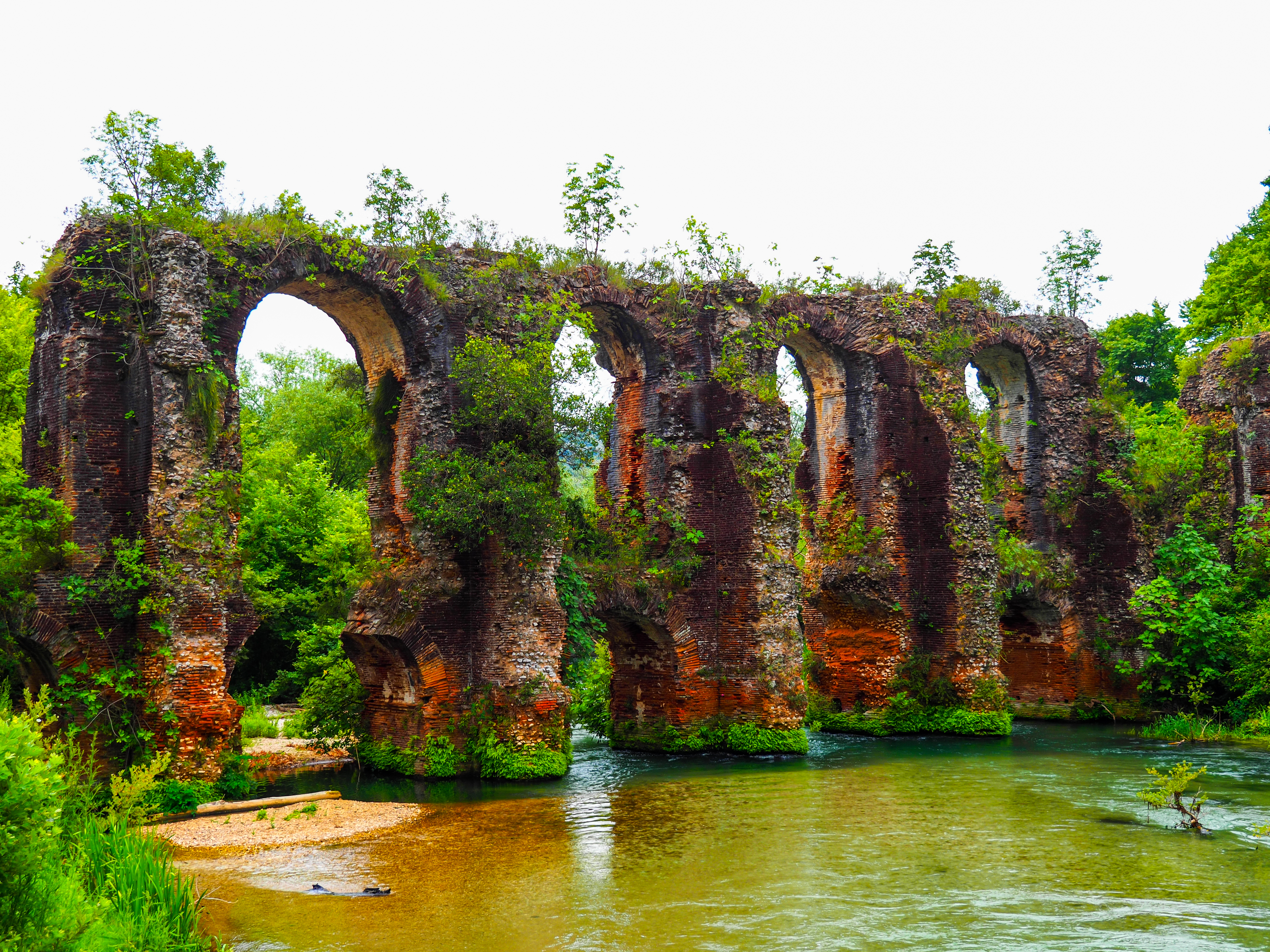 Ρωμαϊκό Υδραγωγείο Νικόπολης«Ρωμαϊκό Υδραγωγείο Νικόπολης»